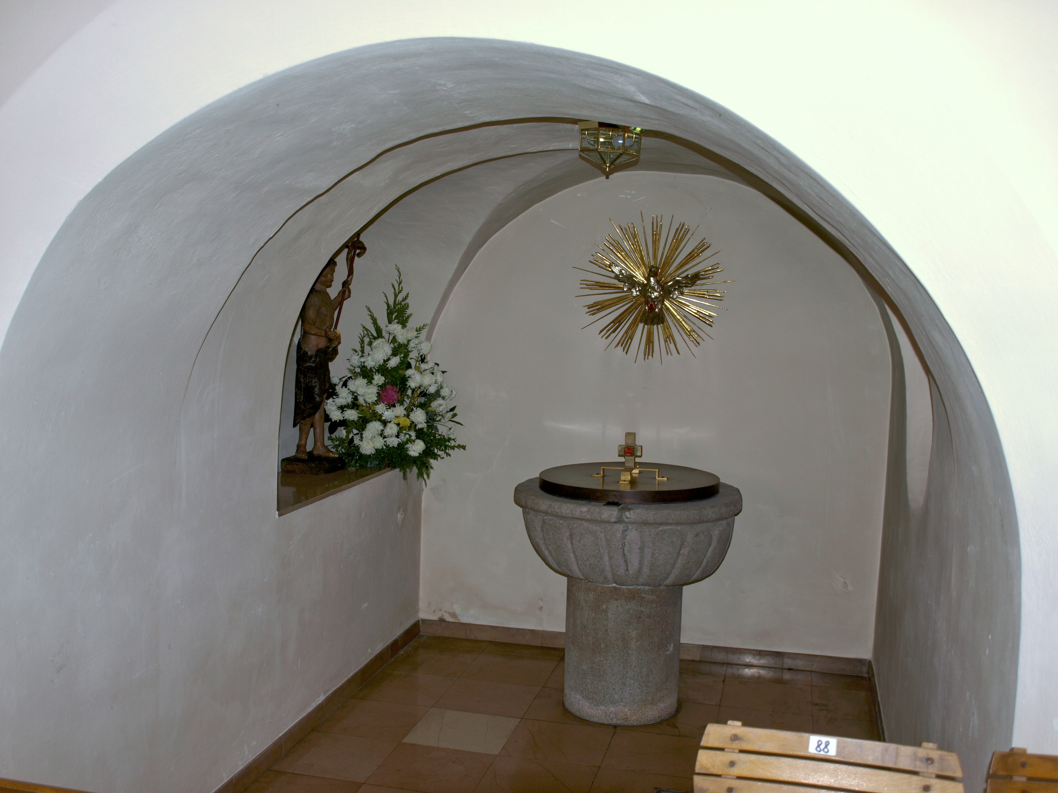 Kath. Pfarrkirche hll. Petrus und Paulus